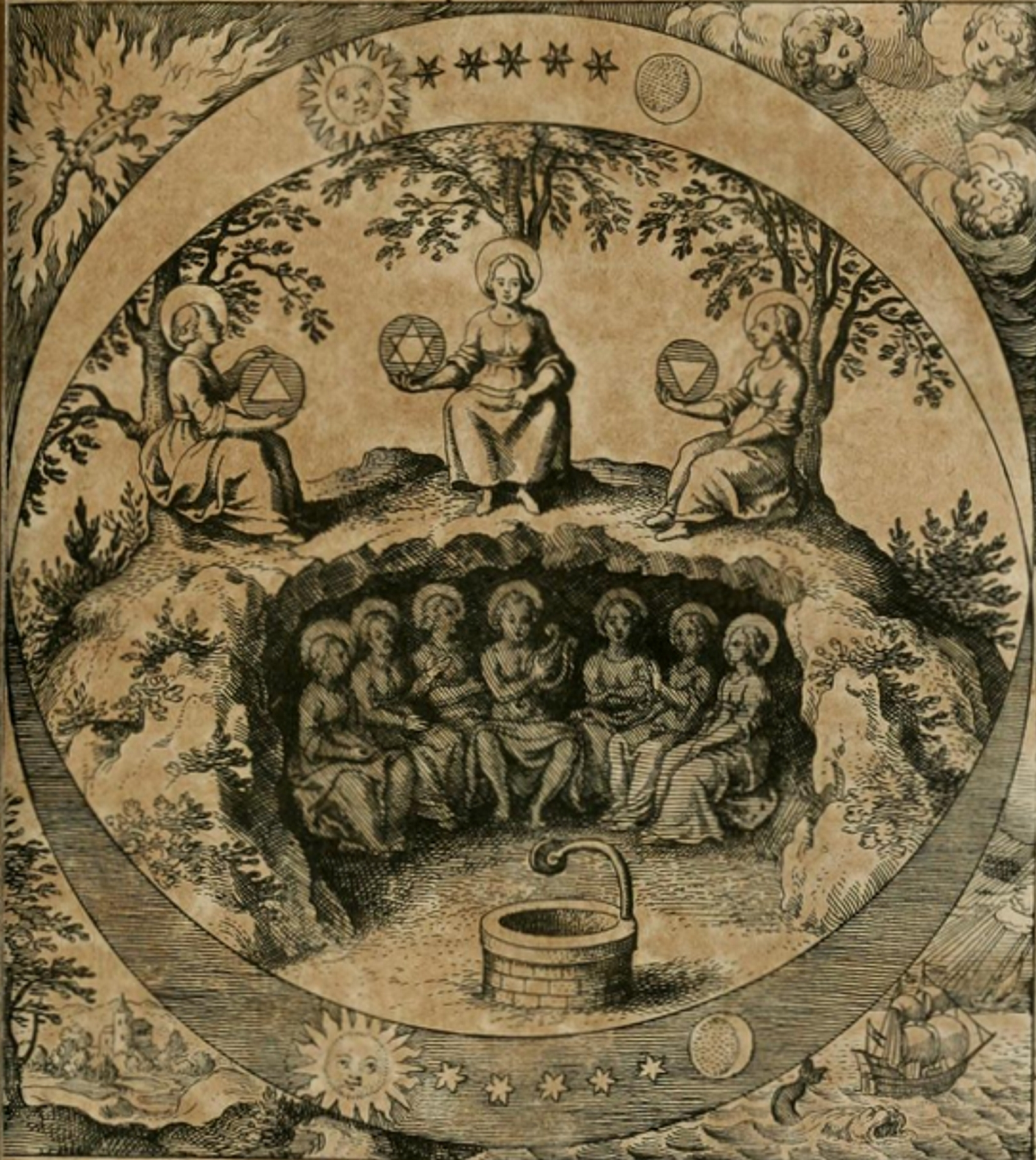 Die sieben Plnatenherrscher im Hades. Illustration in the book "Musæum Hermeticum reformatum et amplificatum" (Musaeum Hermeticum), 1625